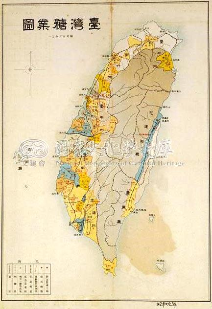 中文（台灣）: 日本領台之後，於1900年設立台灣第一家新式製糖工廠「台灣製糖株式會社」，1902年採取三大措施致力於製糖工業的近代化，包括總督府實施資金援助、指定原料採取區域、保護市場。於是日本資本家競相投資台灣製糖業，至1911年已有11家，至1927年增為45家，其中台灣、明治、鹽水港、大日本、新港、新高等糖廠佔總產量80%。本圖即為主要製糖廠的原料採取區域，分別以不同顏色代表不同糖廠的採取區域，包括台灣、帝國、昭和、新興、昭興、台東、台灣、明治、鹽水港、大日本、新港、新高等。另外圖內也標示出新式製糖工廠、改良工廠的位置，以及官、私設鐵道、州廳所在地、行政區域的界線等等。